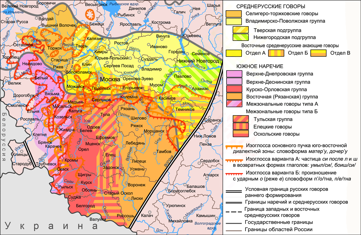 Карта южнорусских и среднерусских групп, подгрупп и отделов говоров в ареалах основного пучка изоглосс и пучков изоглосс вариантов А и Б юго-восточной диалектной зоны. Источники: Захарова К. Ф., Орлова В. Г. Диалектное членение русского языка — 2-е изд. — М.: Едиториал УРСС, 2004. — ISBN 5-354-00917-0, приложение: Диалектологическая карта русского языка (1964 г.). Касаткин Л. Л. Русские диалекты. Лингвистическая география Русские. Монография Института этнологии и антропологии РАН — М.: Наука, 1999, с. 96. Захарова К. Ф., Орлова В. Г. Диалектное членение русского языка — 2-е изд. — М.: Едиториал УРСС, 2004. — ISBN 5-354-00917-0, с. 103—104. Бромлей С. В., Булатова Л. Н., Захарова К. Ф. и др. Русская диалектология / Под ред. Л. Л. Касаткина — 2-е изд., перераб. — М.: Просвещение, 1989. — ISBN 5-09-000870-1, с. 205